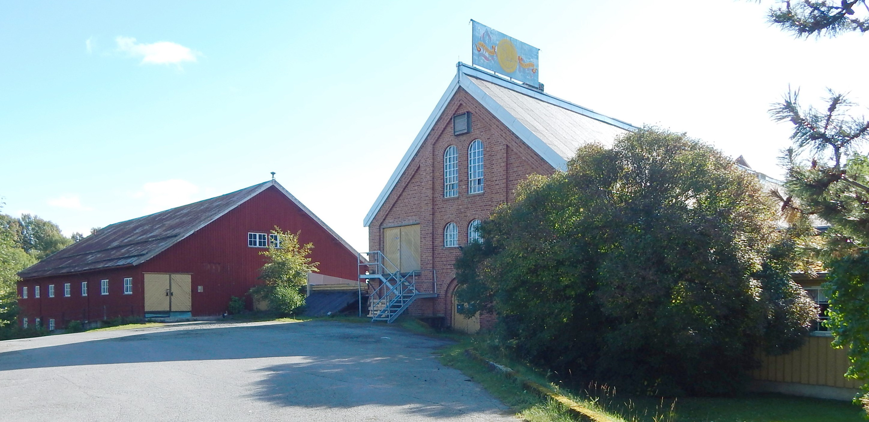 Løiten Brænderi